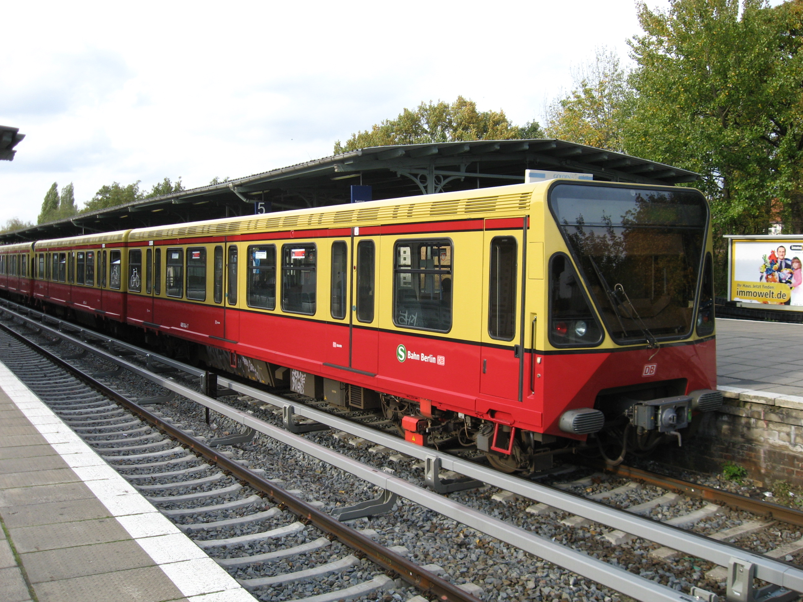 Een S-Bahn station in de buitenwijken van Berlijn